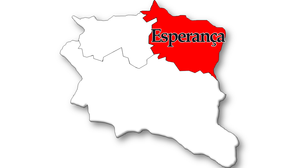 População